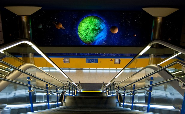 Mural de cerámica en la estación Arganzuela-Planetario del metro de Madrid. Proyecto y realización del ceramista Carlos Alonso y del diseñador Luis Sardá (Estudio Sardá de Diseño, Ures, Guadalajara, España).